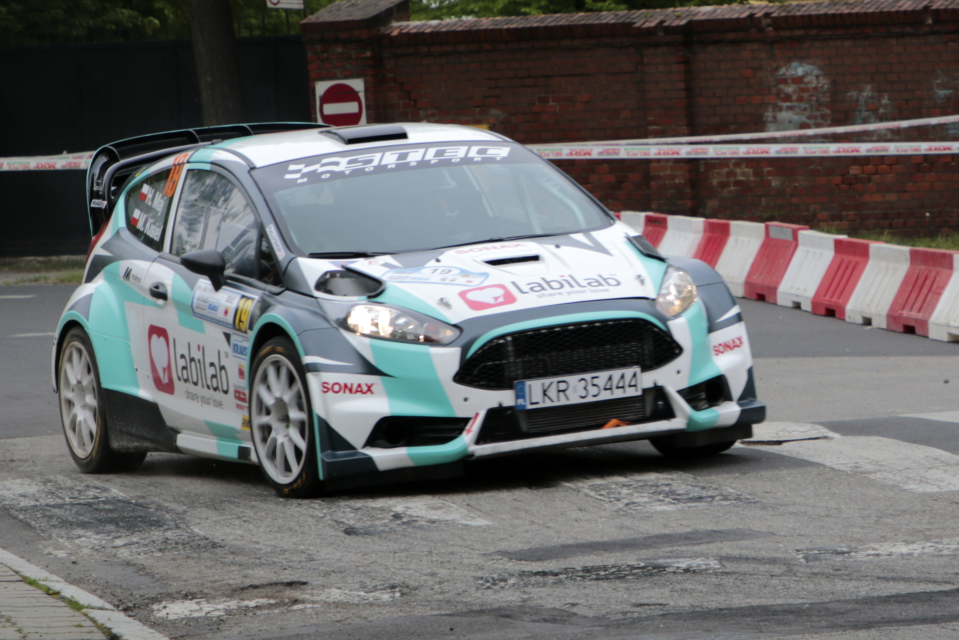 Rajd Świdnicki 2019 - Hubert Maj